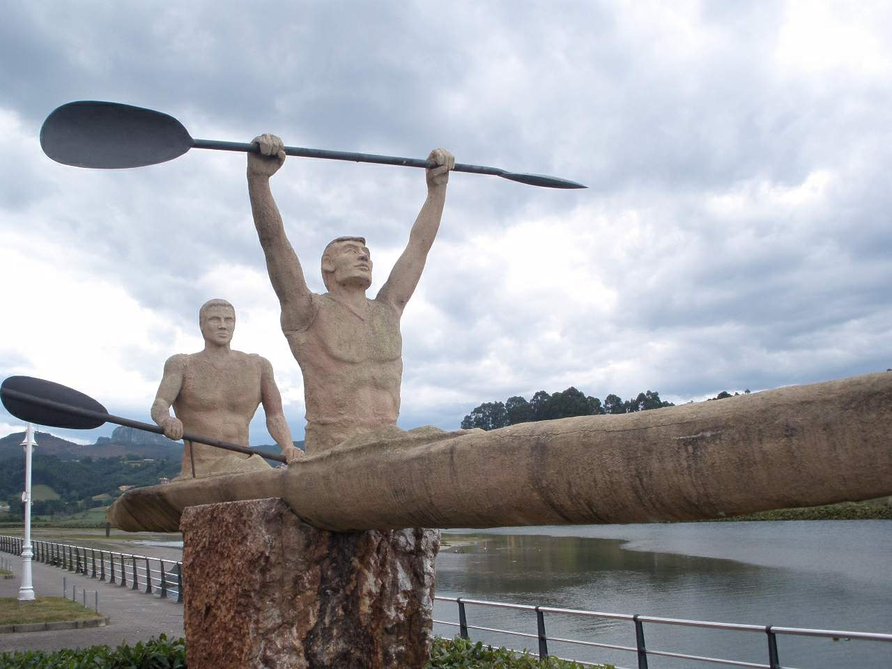 Escultura representativa del Descenso del Sella, en Ribadesella (Asturias)